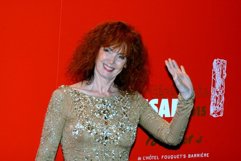 Sabine Azéma à la cérémonie des César